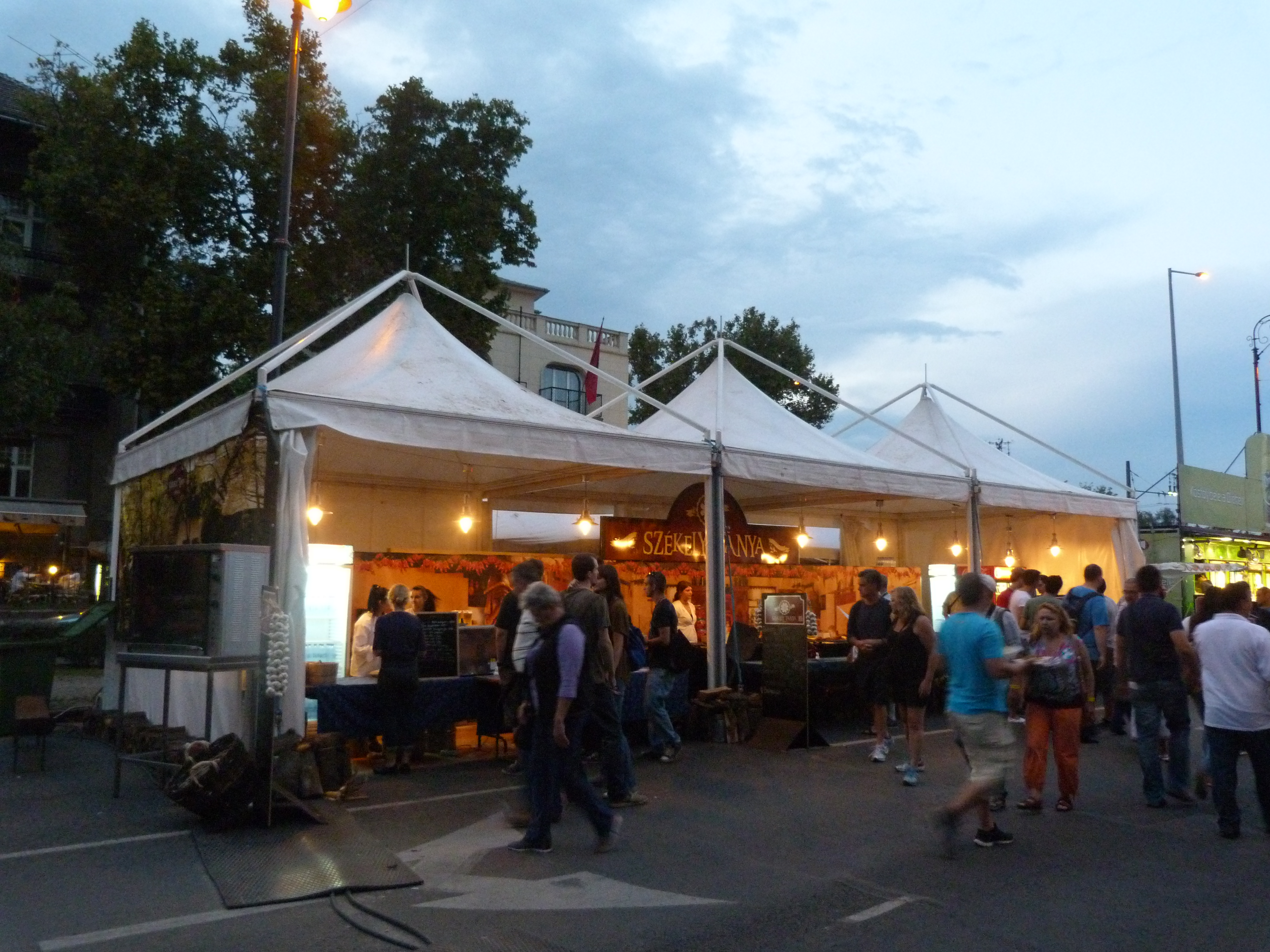 A felvétel 2014. szeptember 21-én vasárnap készült Budapesten, az Andrássy úton. Autómentes Nap. ©© Derzsi Elekes Andor, Budapest, 2014, A kép egészben, vagy részletekben másolását, bármilyen úton történő sokszorosítását és felhasználását a szerző ellenérték nélkül, jogutódjaira is kihatóan megengedi. Az engedély kiterjed a kereskedelmi célú hasznosításra is. Kéri azonban nevének feltüntetését a felhasználás során. A Metapolisz sorozat valamennyi képe és filmje Creative Commons alatti valamint kereskedelmi - for profit - célra is felhasználható. Ajánlott hivatkozás: Derzsi Elekes Andor: Metapolisz DVD line